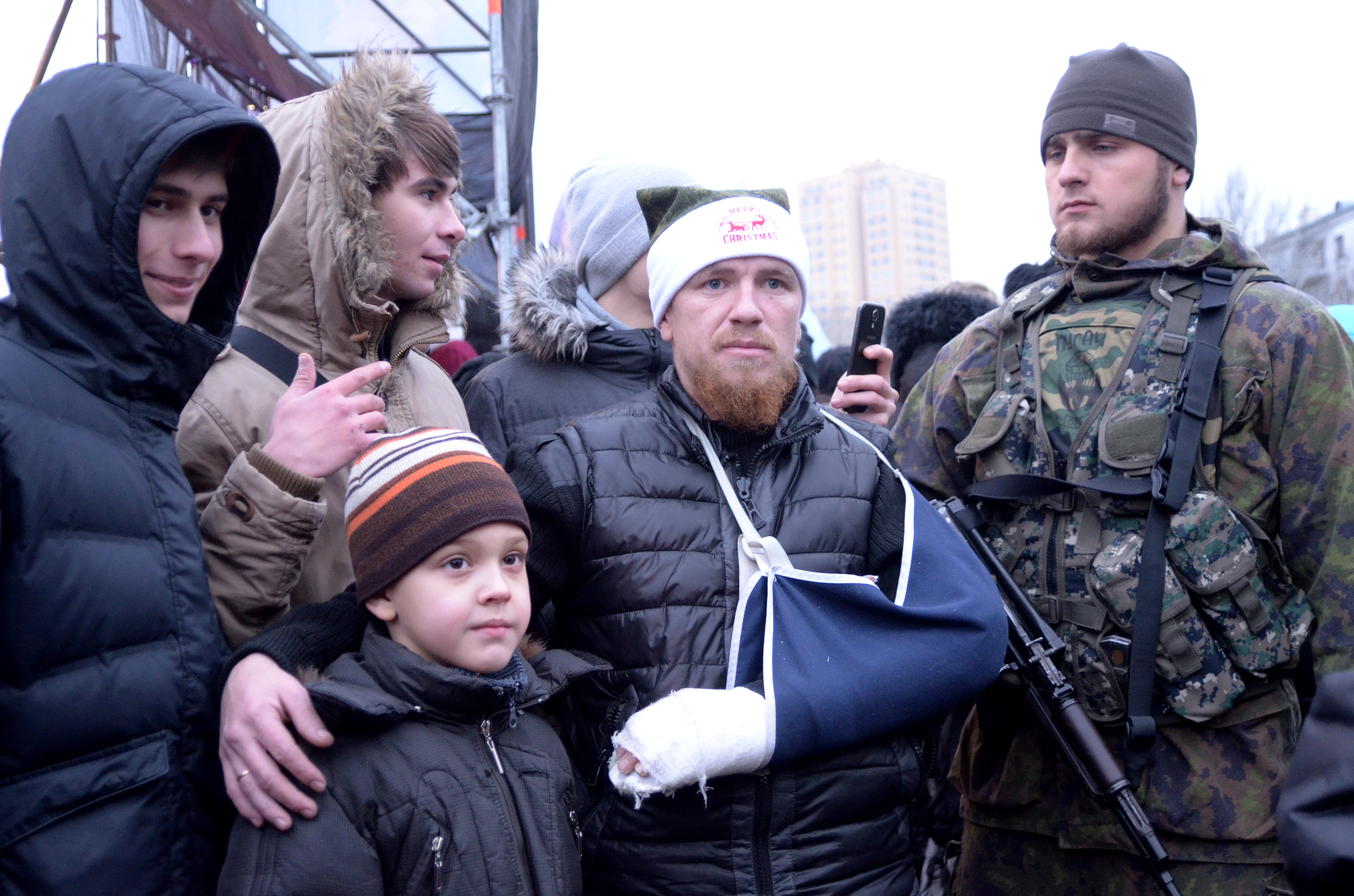 Открытие новогодней ёлки в Донецке